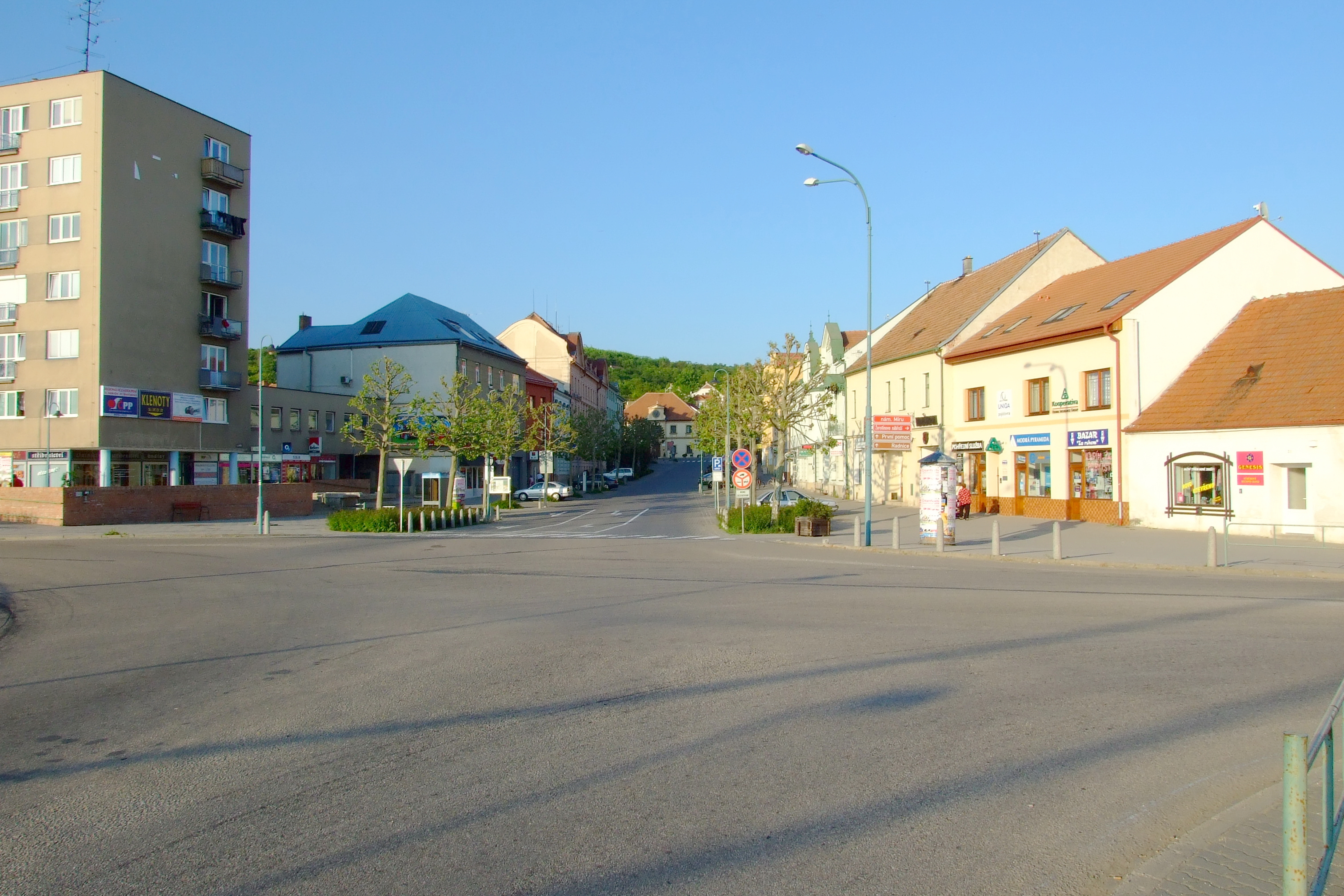 Židlochovice - Náměstí Míru, vyfotografované od západu